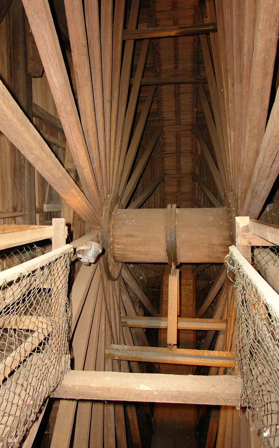 Das Polhemsrad (Polhemshjulet) ist ein Wasserrad, das in der schwedischen Bergwerksregion Bergslagen (nahe Norberg) von 1876 bis 1920 Teil eines Antriebsystems zur Entwässerung von Erzgruben war. Foto: Blick in das Rad aus Achsenhöhe